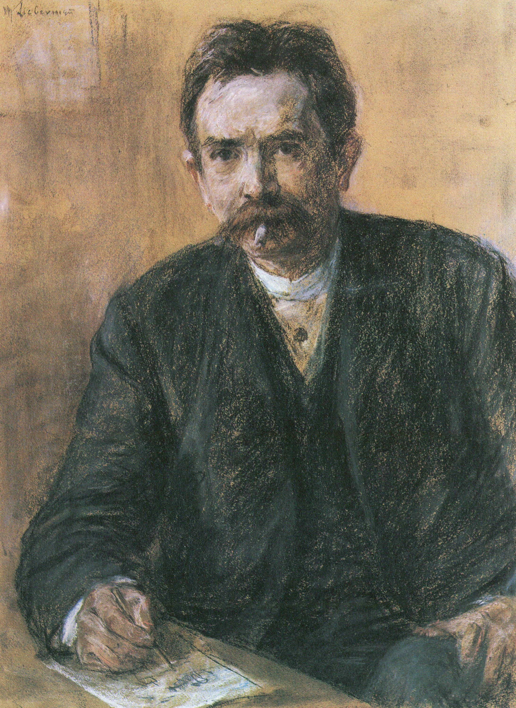 Porträt des Schriftstellers Eduard Grisebach von Max Liebermann, frontales Hüftbild, am Tisch sitzend und schreibend, Pastell auf Malkarton, 78 × 58 cm, 1893, bezeichnet oben links: „M Liebermann“, Berlin, Museum.